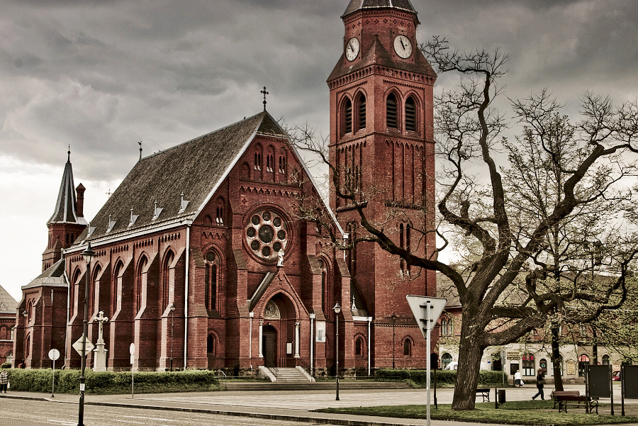 Kostel svatého Pavla Ostrava Vítkovice